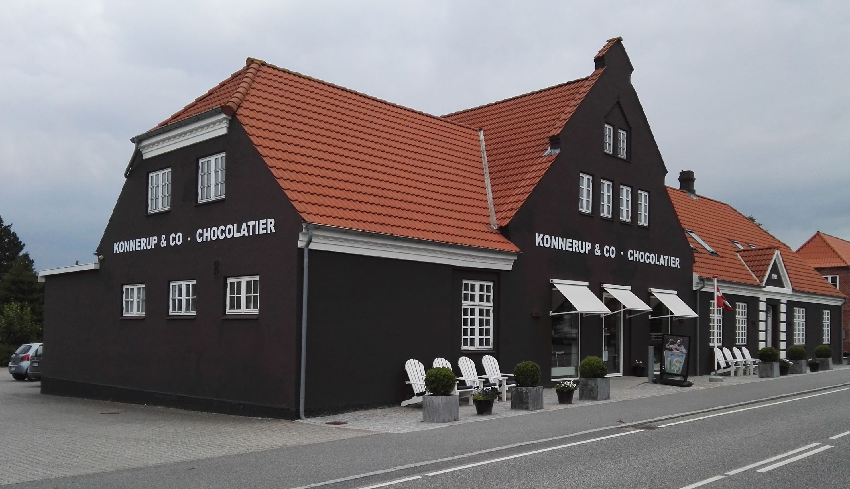 Chokolatier i Vester Åby